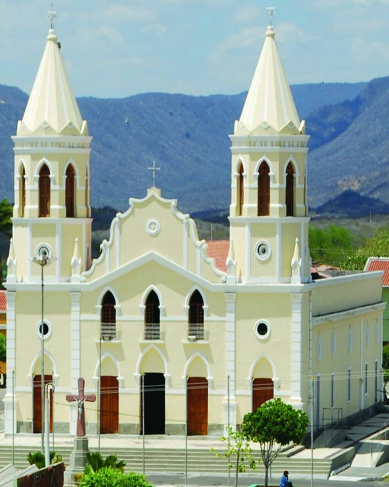 Imagem da Matriz Santuário de Santana do Matos